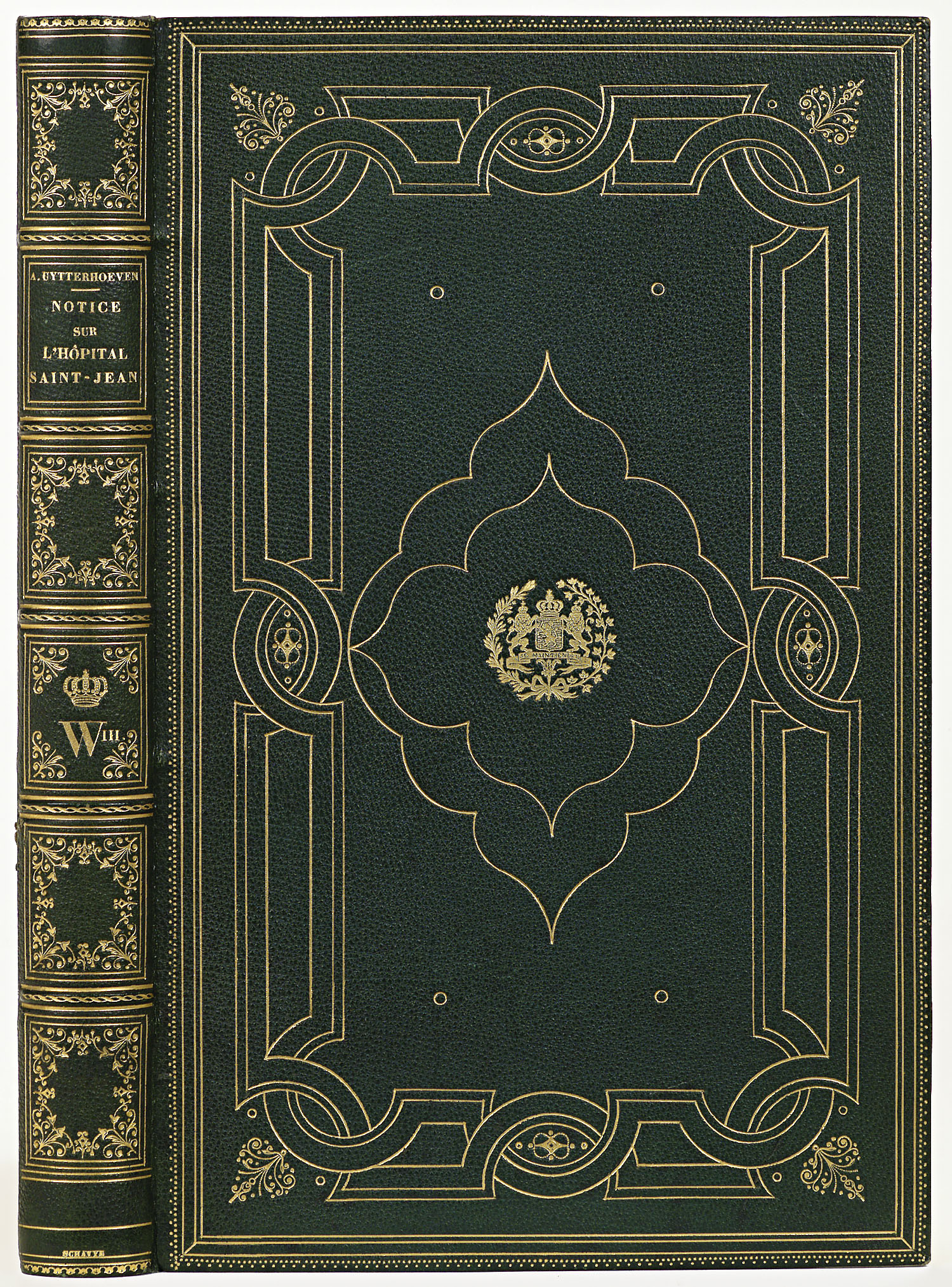 Inhoud: André Uytterhoeven. Notice sur l'hôpital Saint-Jean de Bruxelles. Bruxelles, 1852.